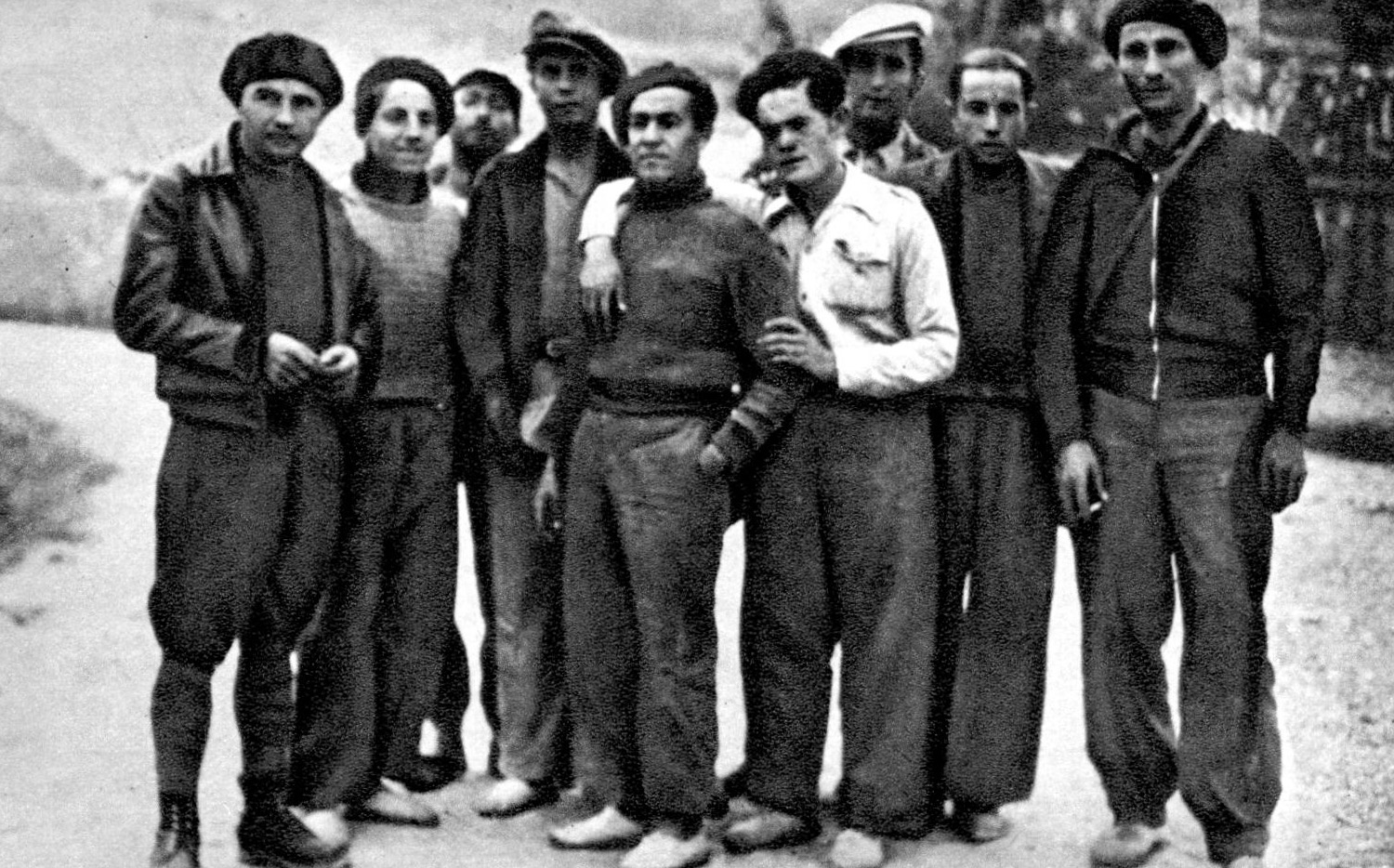 Srpskohrvatski / српскохрватски: Grupa diverzanata u Španiji. Vođa grupe je Ivan Hariš (prvi ievo). Među njima je i Petar Vukelić. Juli 1937. godine.